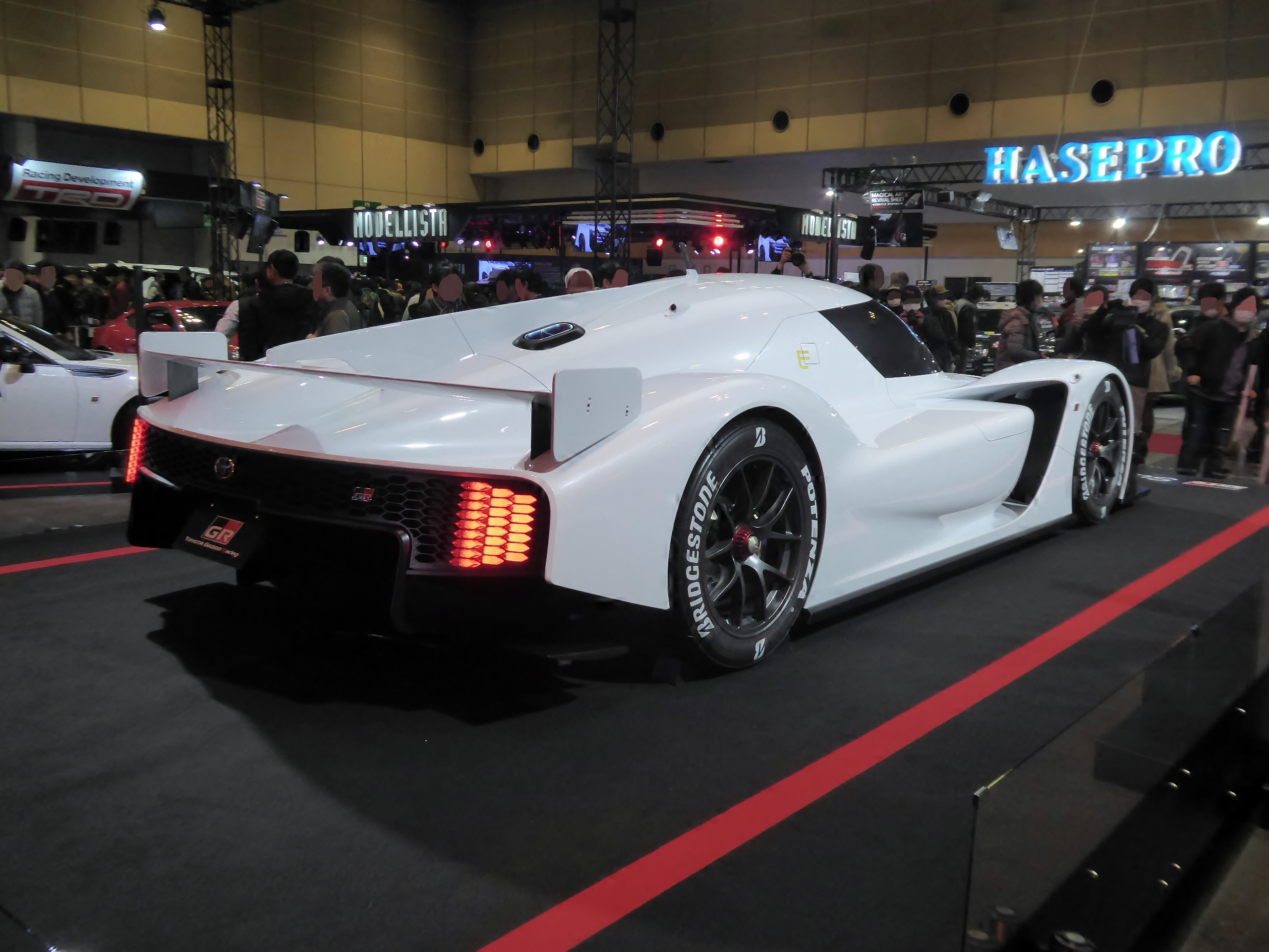 大阪オートメッセ2018に於いてトヨタ・GRスーパースポーツコンセプトを撮影。